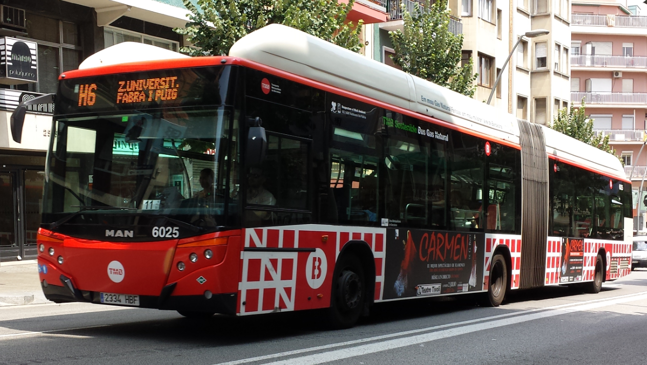 Línia H6 XOAB a Av. MAre de Déu de Montserrat direcció Zona Universitària.